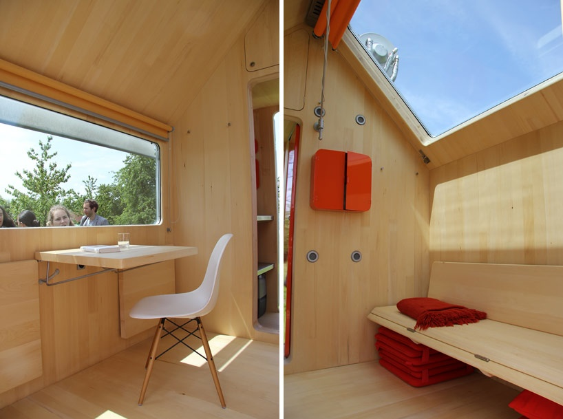 vue intérieure de Diogène de Renzo Piano